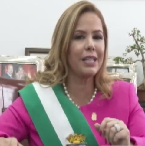 Angélica Sosa en mayo de 2016